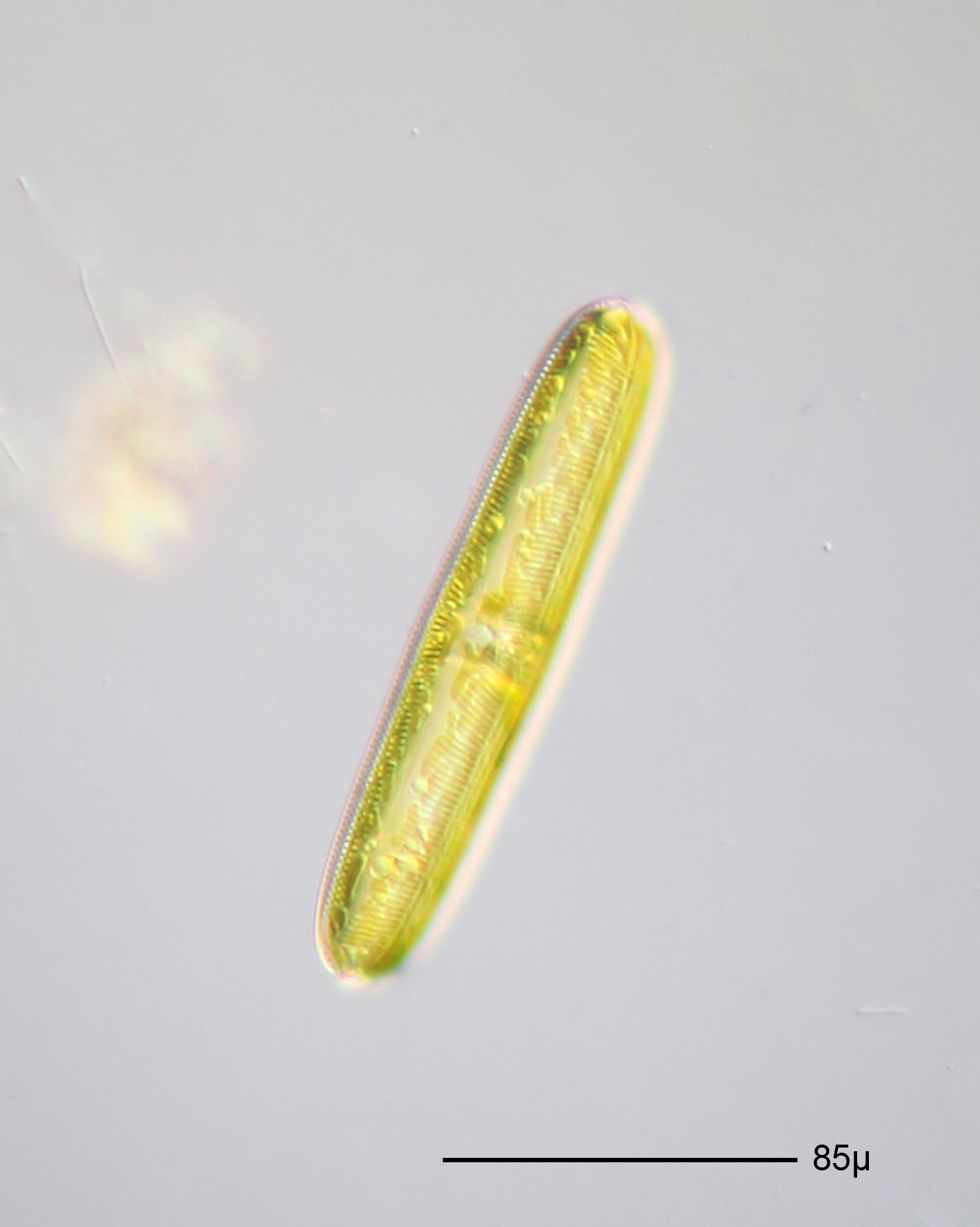 Navicula oblonga - 160x - Schrägsicht